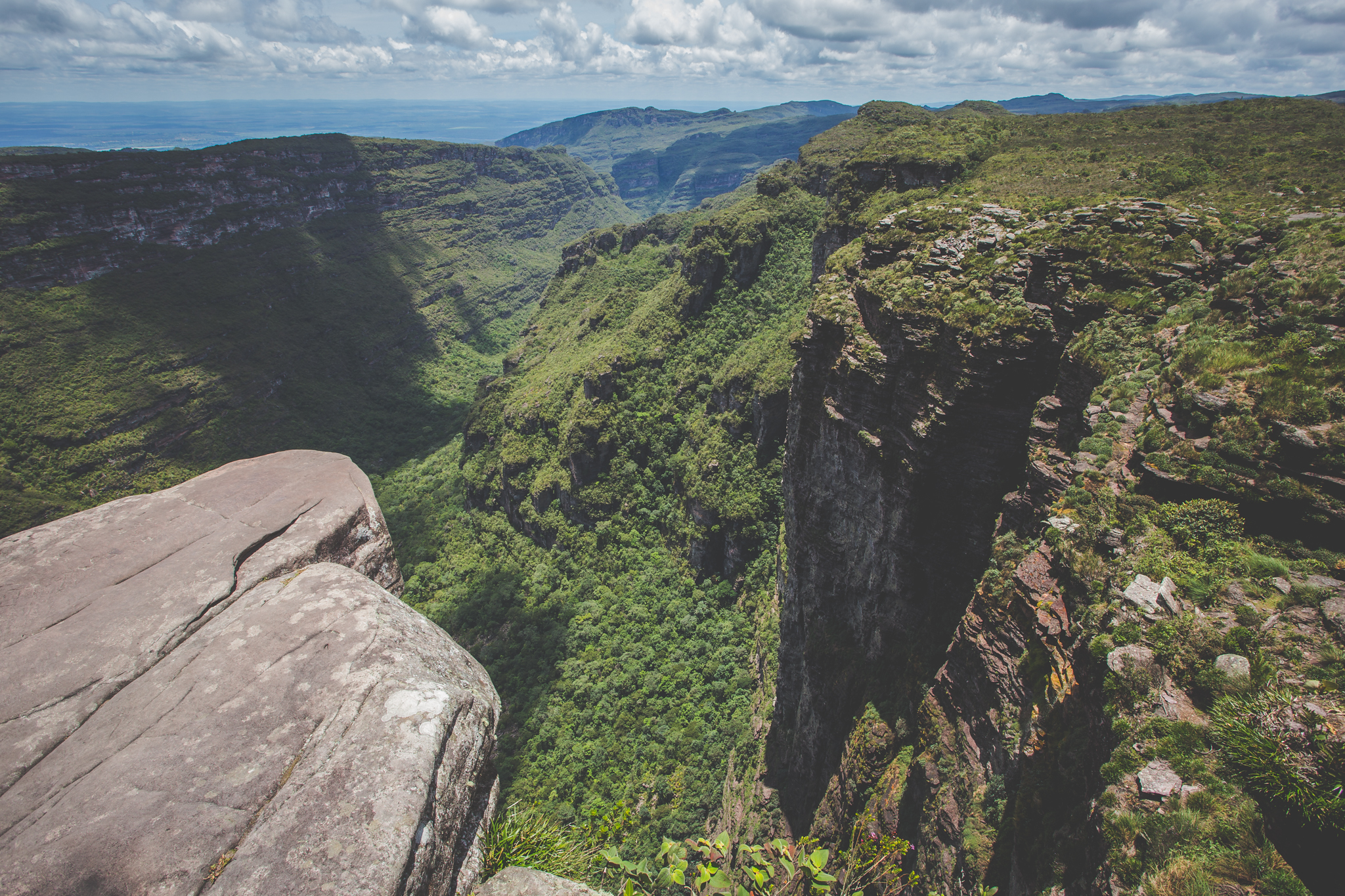 Vale do Capão, município de Palmeiras, Bahia, Brasil.